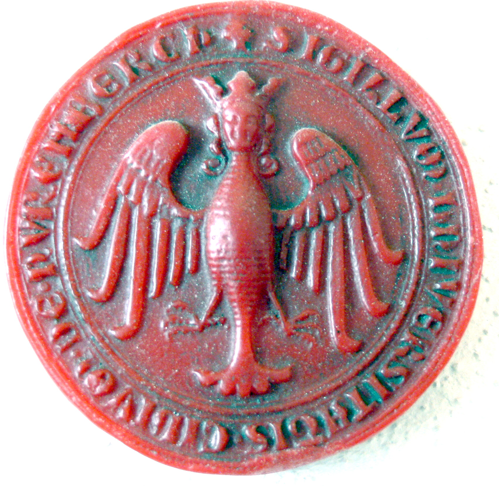 Siegel der Freien Reichsstadt Nürnberg 1473. Umschrift: "Sigillum Universitatis Civium de Nuremberch."